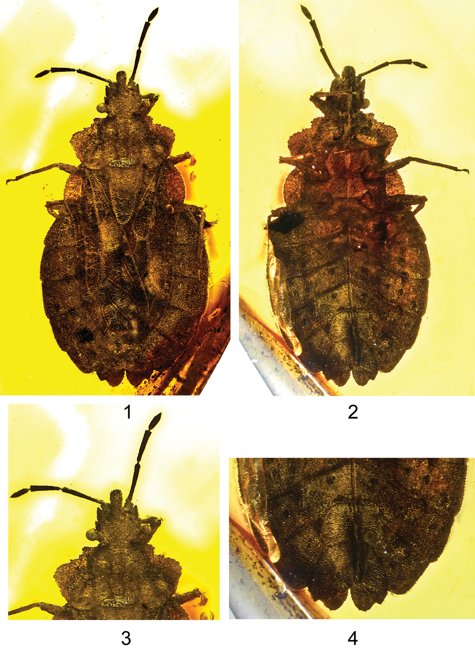 Aradus macrosomus (Aradidae), insecte fossile - 1 – vue dorsale ; 2 – vue ventrale ; 3 – tête et pronotum, vue dorsale ; 4 – segments terminaux , vue ventrale.